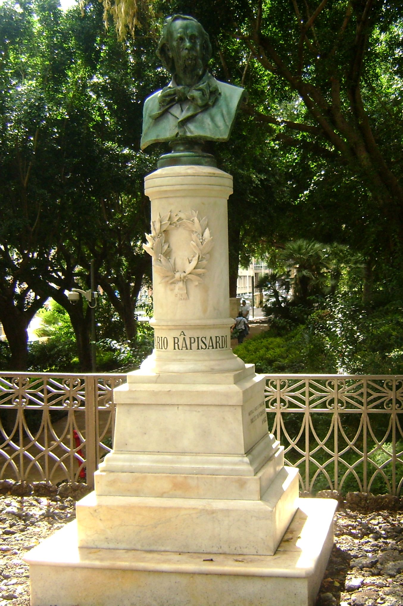 Mario Rapisardi - Giardino Bellini - settembre 2010